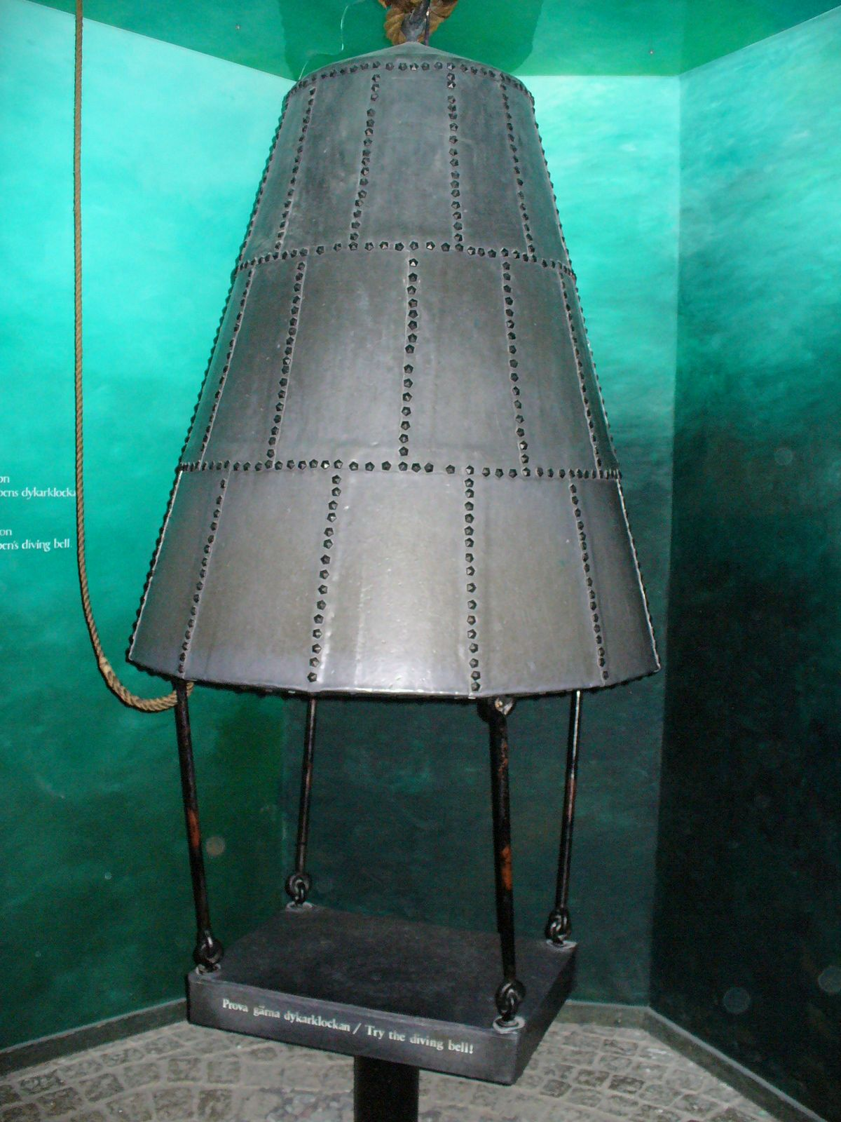 A buvarharang, amivel az elsullyedes utan kiemeltek vagy 50 agyut. Vasa muzeum, Stockholm. Sajat digitalis kamera. --Math 2005. október 18., 17:58 (CEST) hivatkozando forras: Brendel Matyas